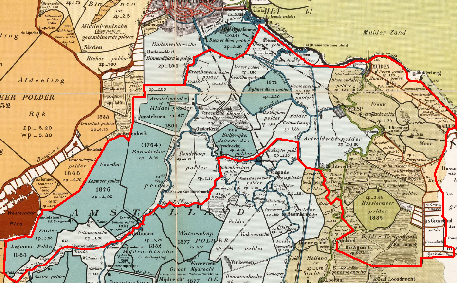 Approx. boundaries "Drecht en Vecht"